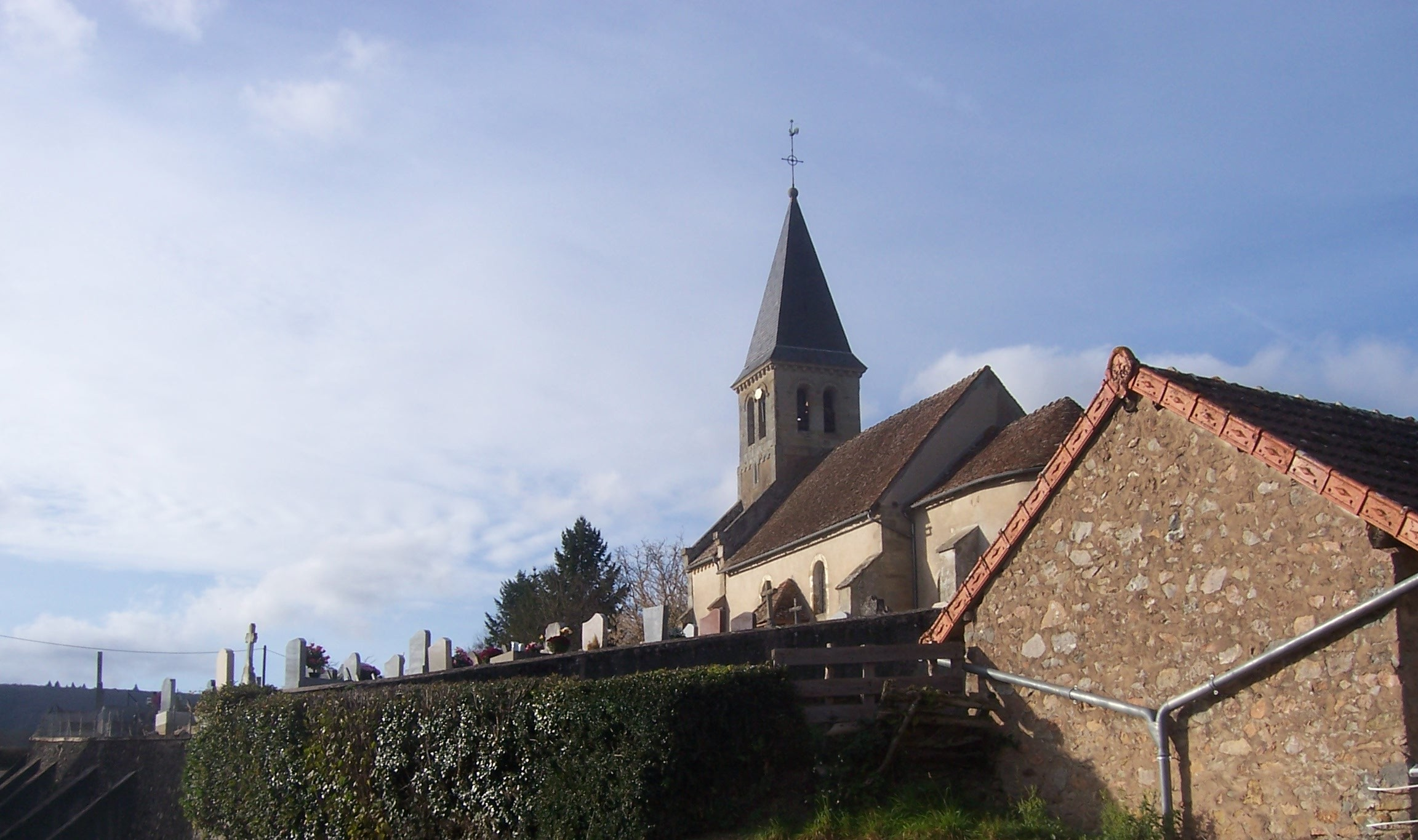 Église à Barnay